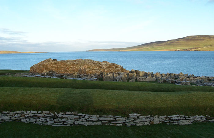 Broch of Gurness, Orkney